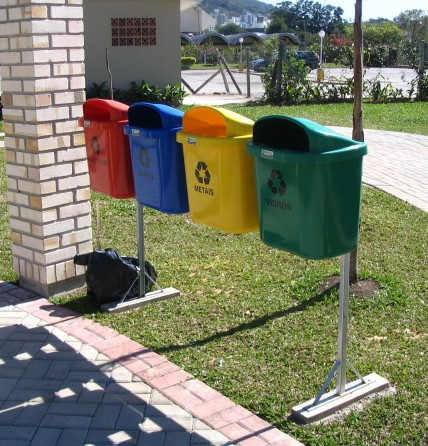 Foto mostrando recipientes para separación de residuos domiciliarios